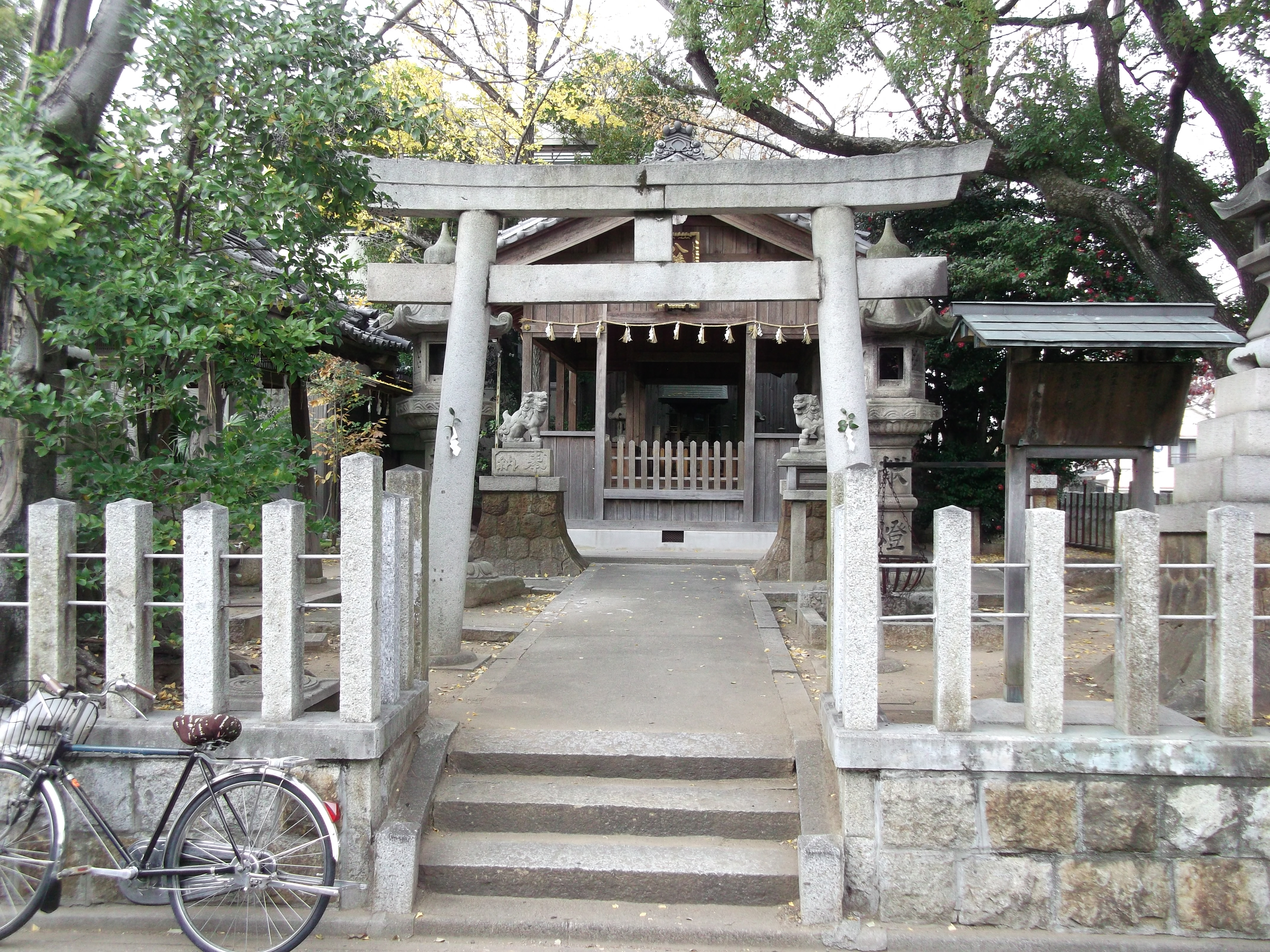 名古屋市昭和区池端町鎮座の八幡神社を南側から写す